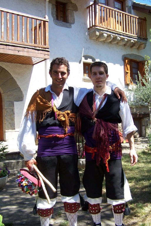 Después de danzar en la procesión de San Lorenzo, ya podíamos ir Diego y yo a nuestras respectivas "comilonas". Luego siesta.